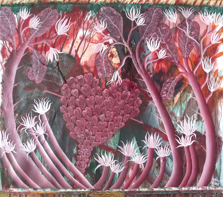 Die Aufnahme entstand am 15.9.2015 im Berliner Atelier von Helma